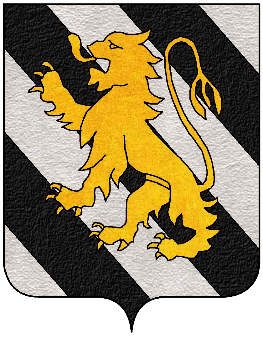 Stemma della famiglia Binciola